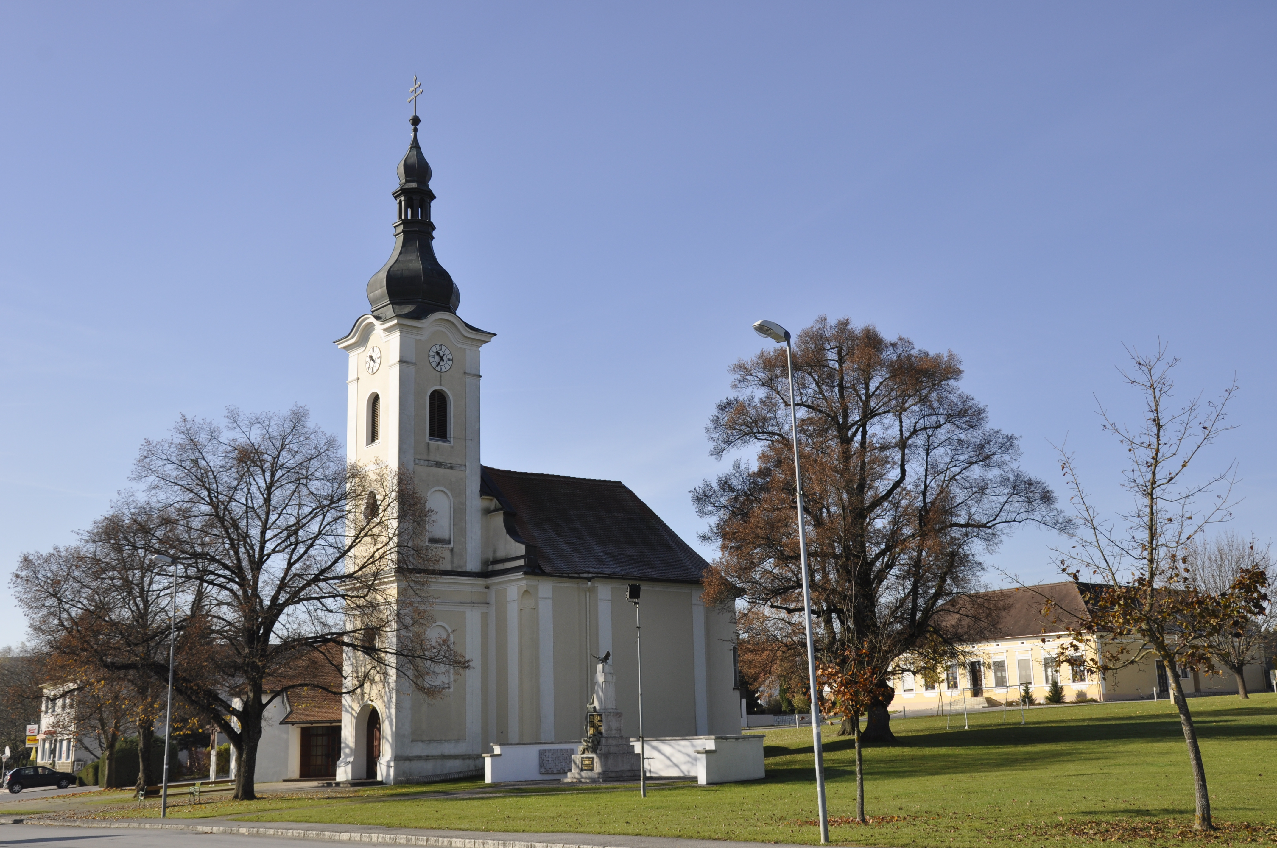 Kath. Pfarr- und Wallfahrtskirche Mariae Himmelfahrt